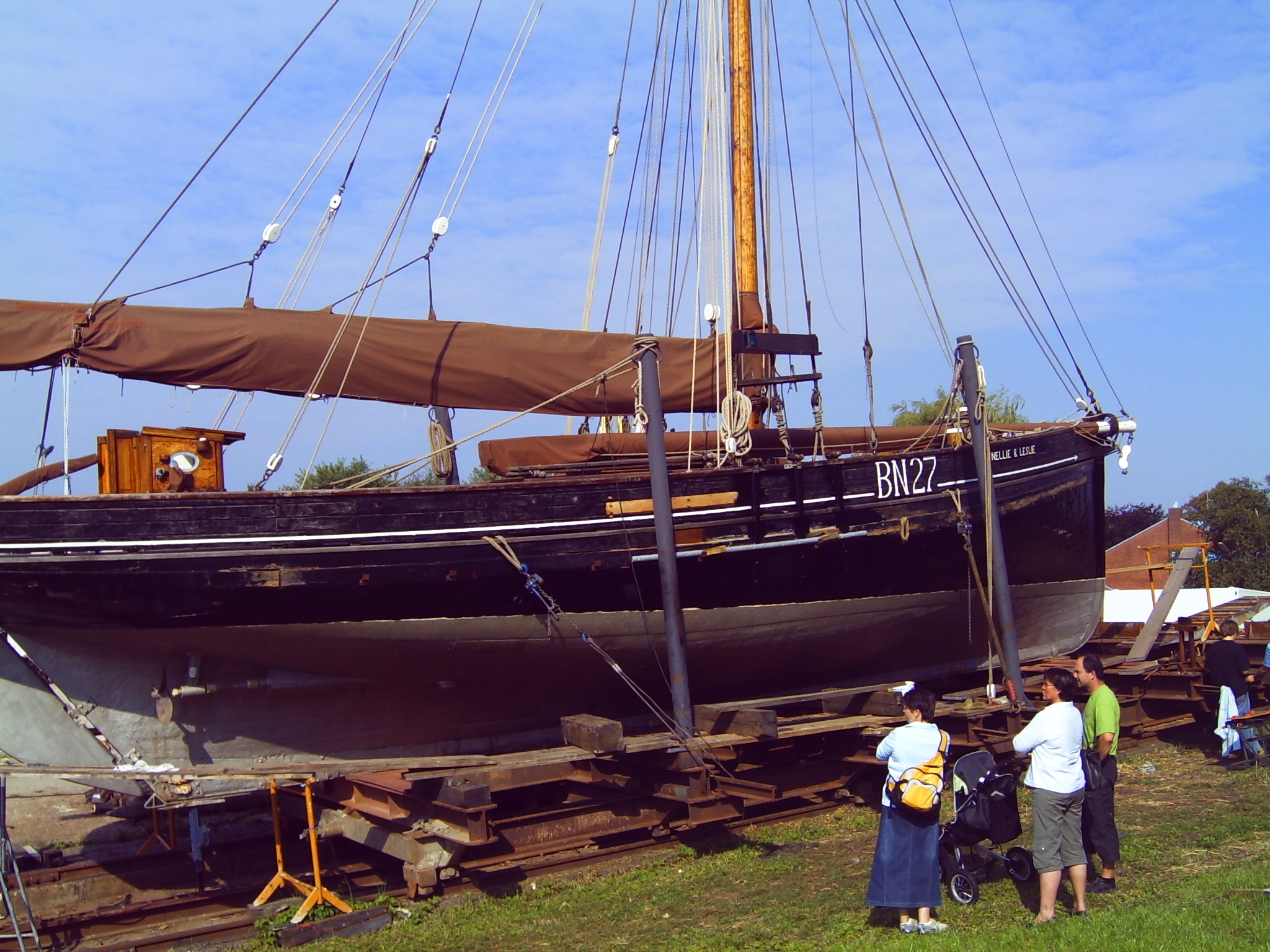 Nellie & Leslie, ein ehemaliger englischer Kutter